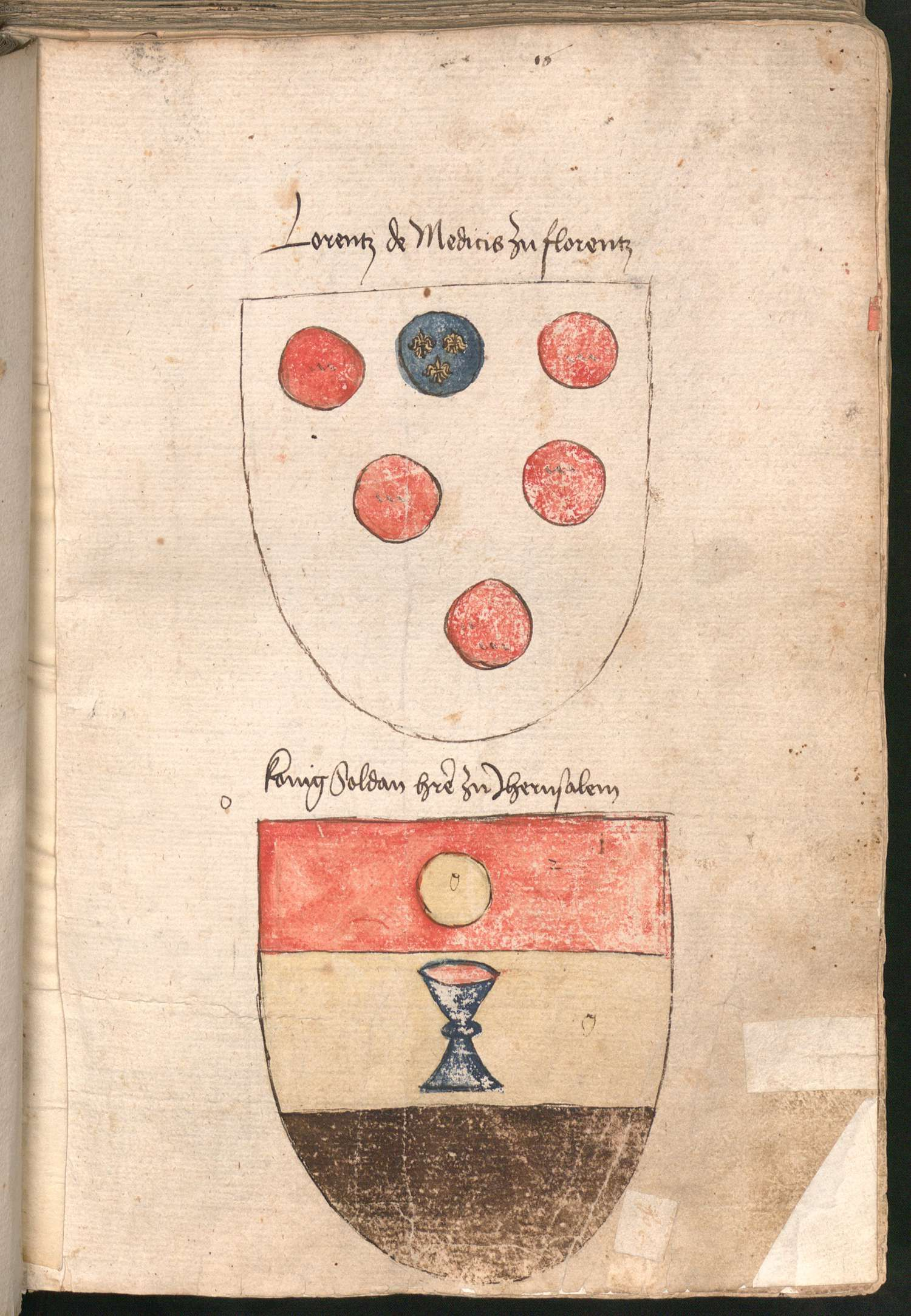 „Wernigeroder (Schaffhausensches) Wappenbuch“; Süddeutschland 4. Viertel 15. Jh. Bayerische Staatsbibliothek München, Cod.icon. 308 n Wappen Lorenzo de'Medici König von Jerusalem